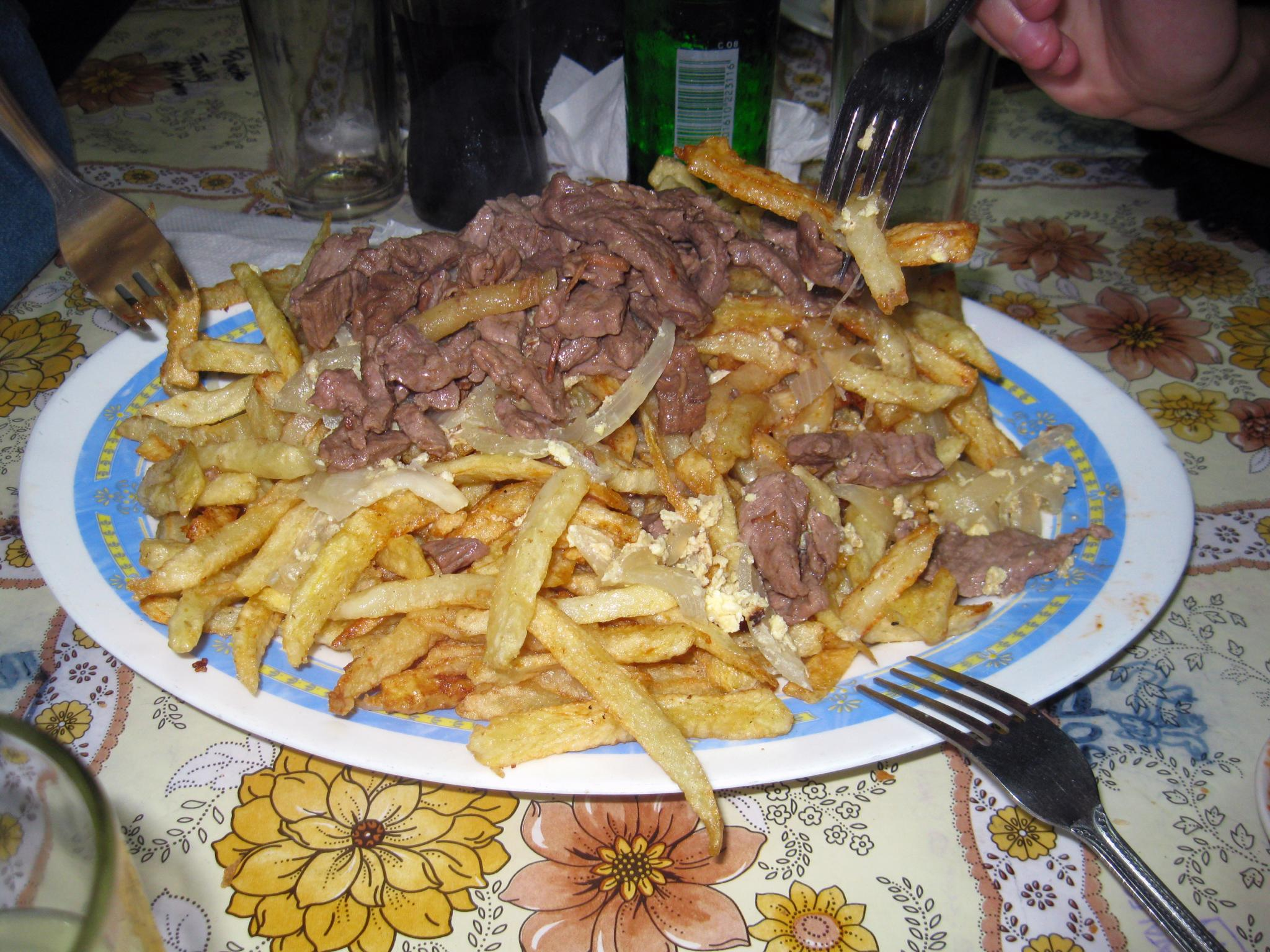 Una chorrillana para tres personas en el restorán J Cruz de Valparaíso.